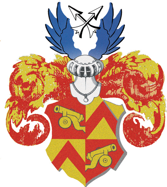 Wappen der Familie von Hertell Selbst gestaltet auf Grund der Vorlagen in der Familienchronik und weiterer Quellen DrBigTDrBigT 2003